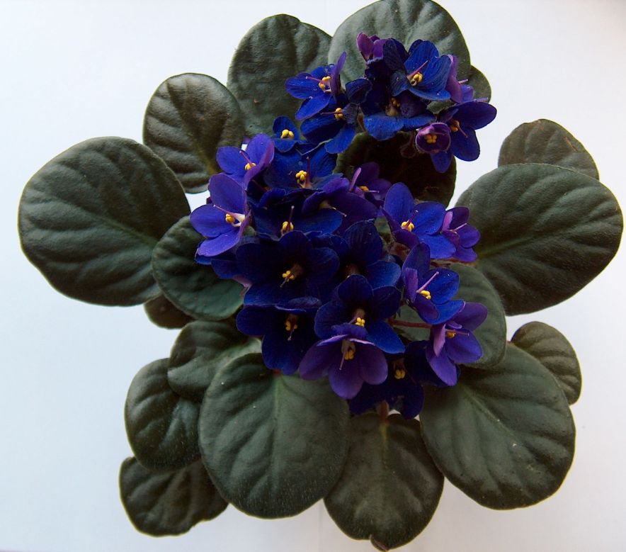 Usambaraveilchen mit blauen Blüten